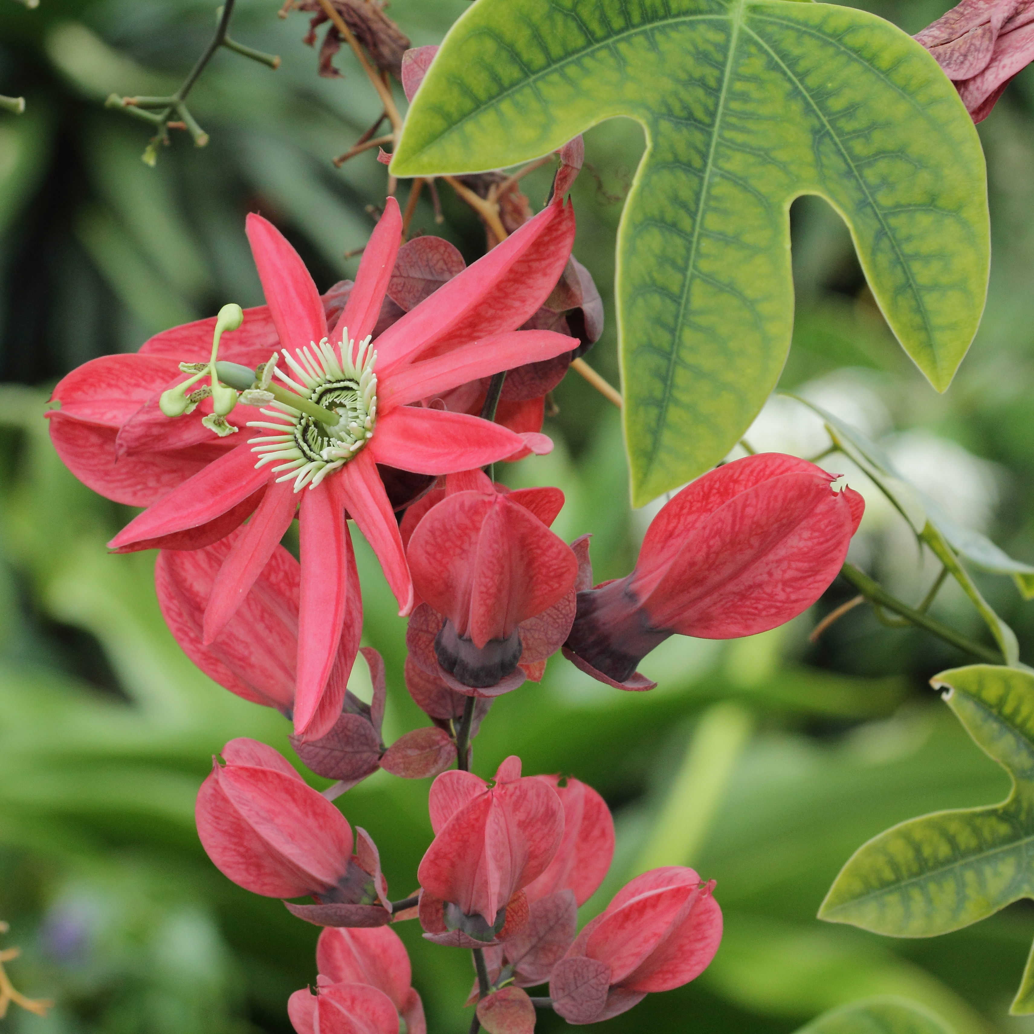 Passiflora racemosa, identifierad med hjälp av befintlig skylt vid Kew Gardens, London.